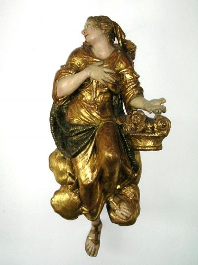 Sv.Alžběta.Polychromovaná zlacená dřevořezba. 18.století